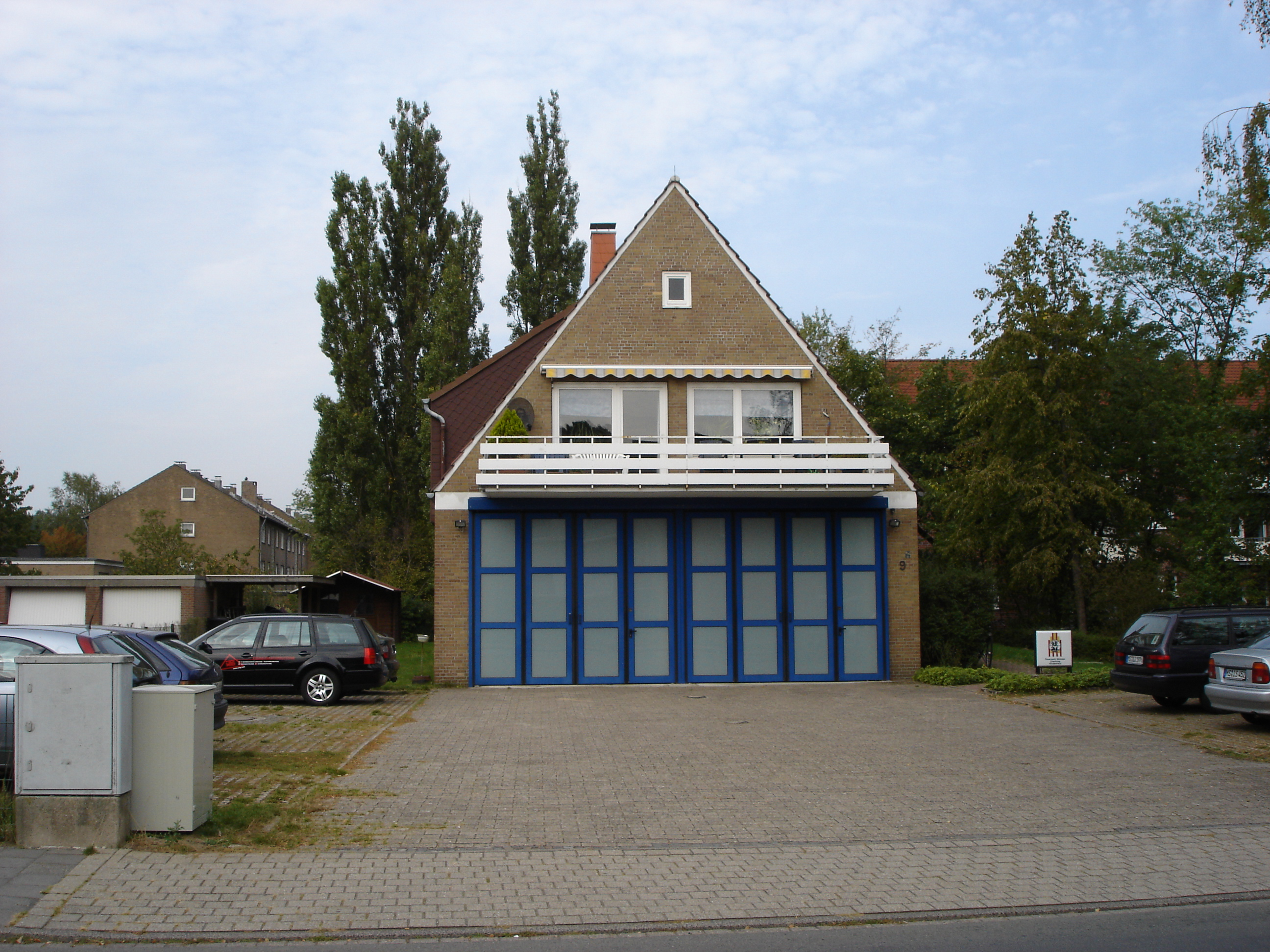 Gerätehaus der Feuerwehr in Kinderhaus, Münster, Deutschland